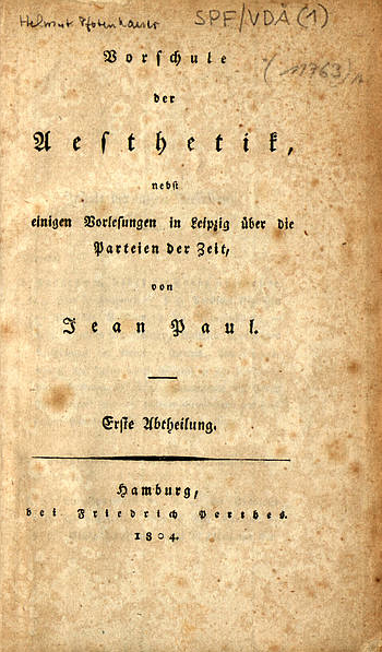 Vorschule der Ästhetik von Jean Paul Richter